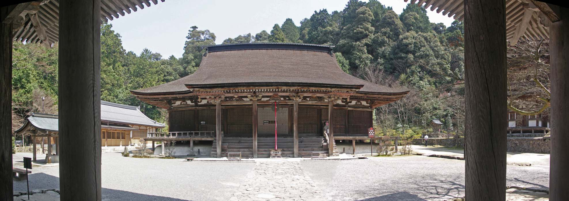 Saimyouji temple , 西明寺 本堂